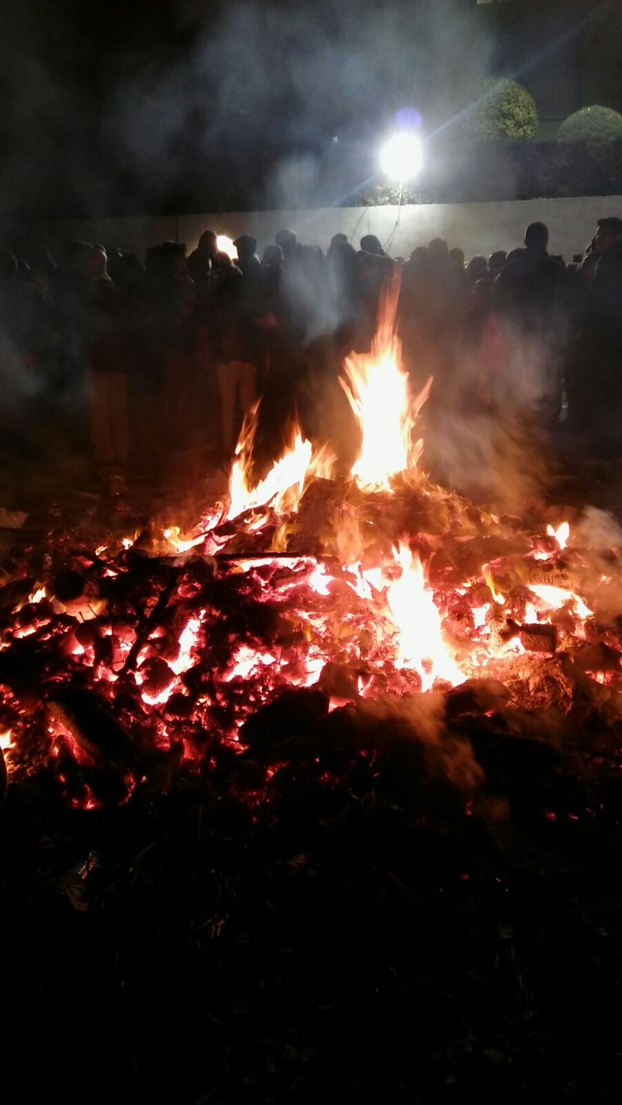 Празнува се всяка година на 17 януари.